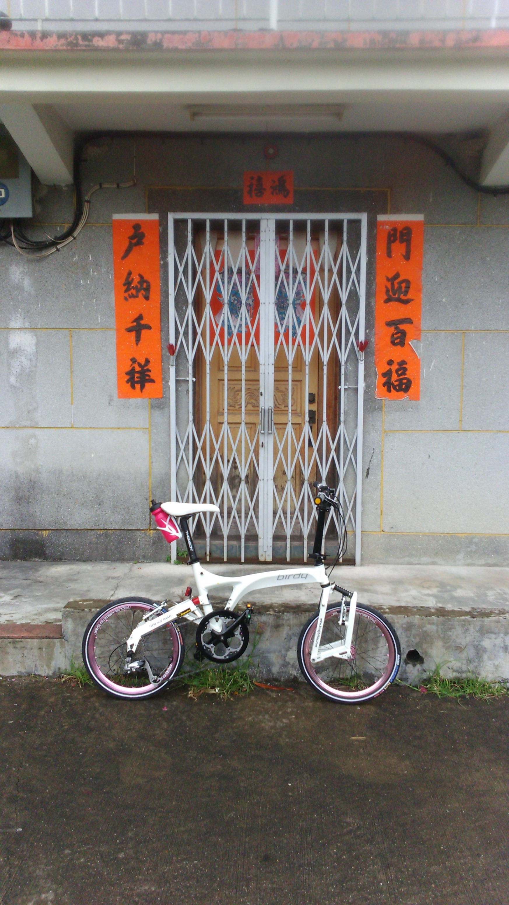 Birdy 摺疊車